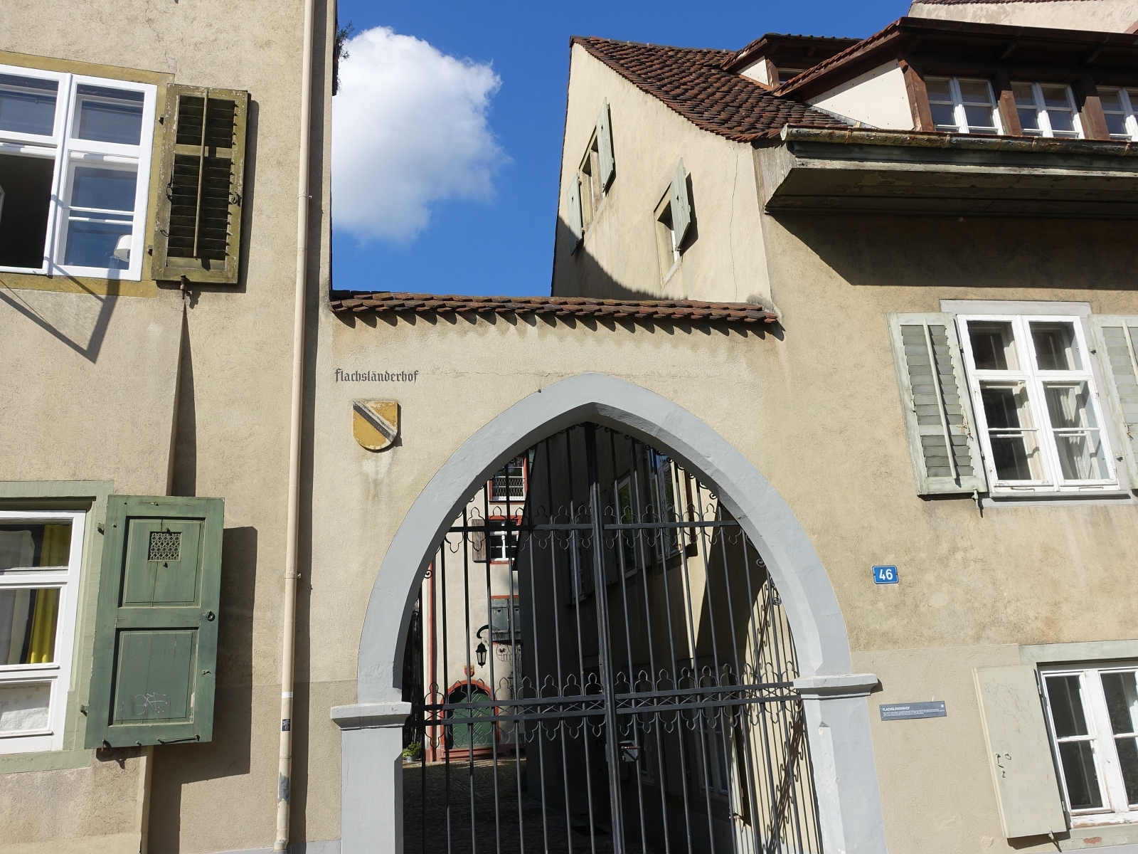 Nadelberg 46, Liegenschaft von Hans von Flachslanden (1412-1476) Bürgermeister von Basel